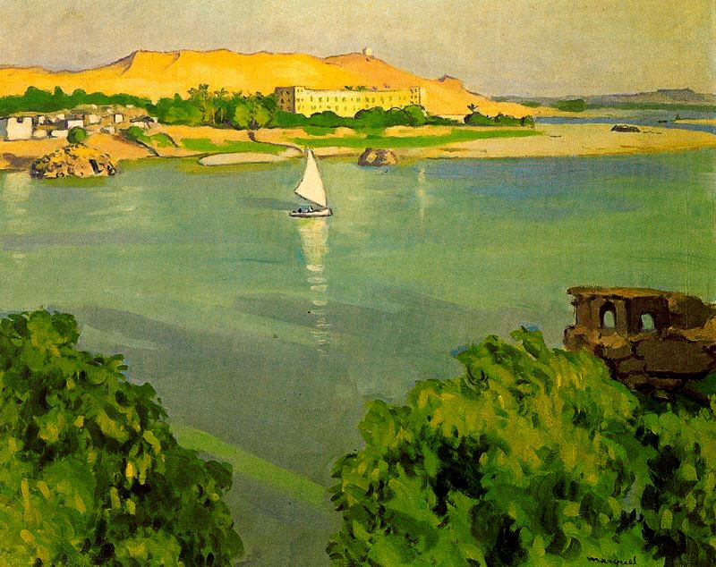 Assouan le matin